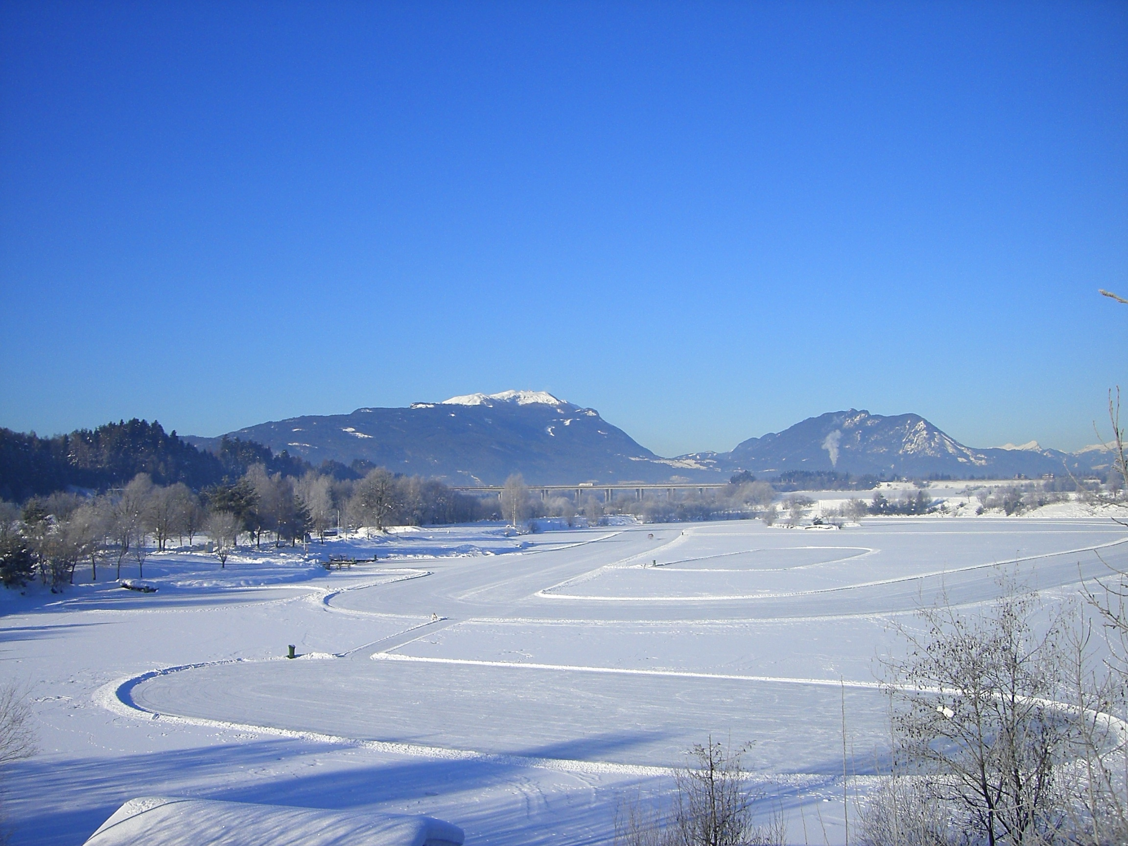 Lake Silbersee in Winter